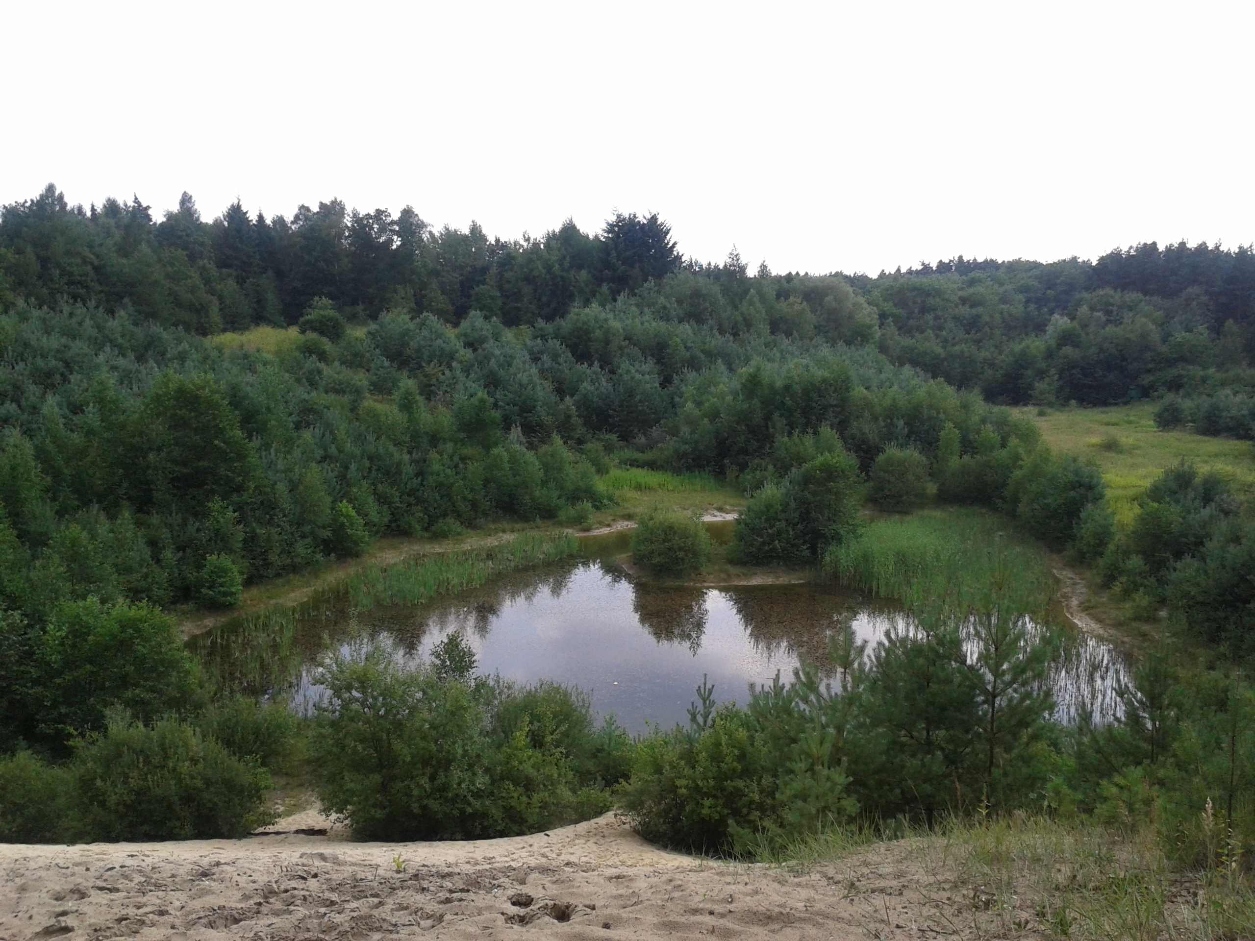 Versteckter See im Schutzgebiet Eibia/ Lohheide in Bomlitz bei Walsrode